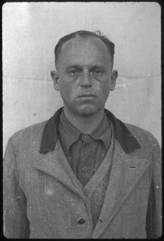 Fritz Hintermayer (* 28. Oktober 1911 in Grafing bei München; † 29. Mai 1946 in Landsberg am Lech) war SS-Obersturmbannführer und deutscher Mediziner. Zudem war er SS-Arzt und zuletzt Lagerarzt im KZ Dachau.